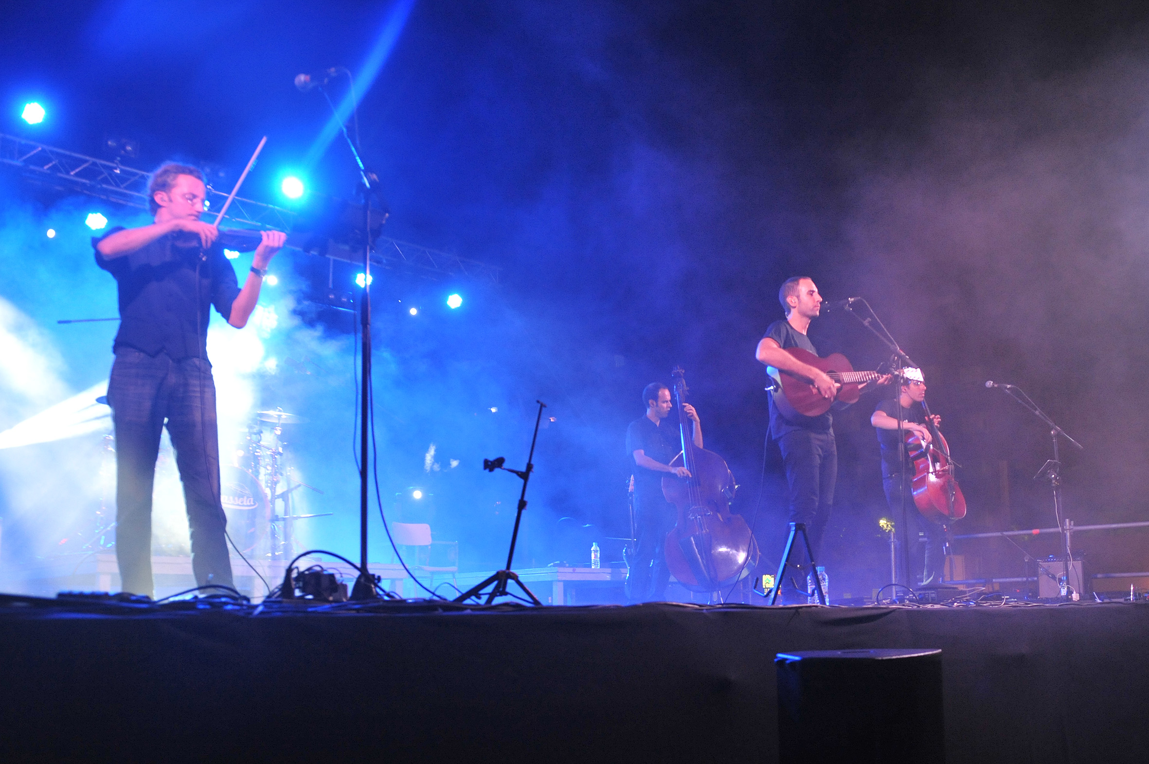 Concert de Blaumut a Esplugues de Llobregat, 20 de setembre 2014.